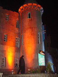 Fachada do Castelo Montebello Medieval, localizado na cidade de Teresópolis/RJ.